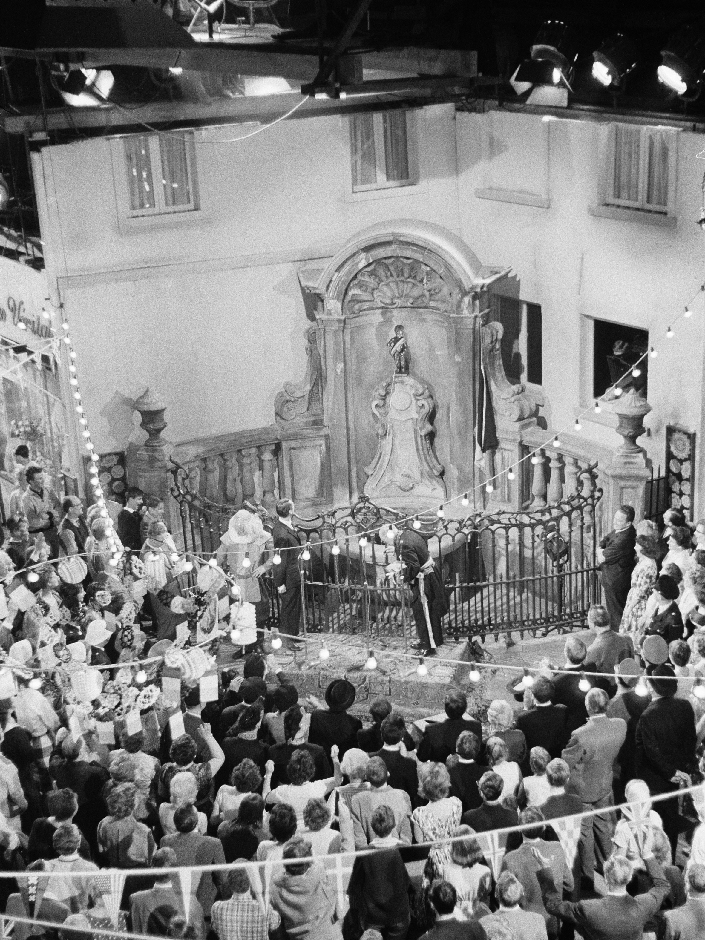 Nieuwe film van Bert Haanstra "De Zaak M.P." opgenomen in Cinetone studio te Amsterdam 16 mei 1960